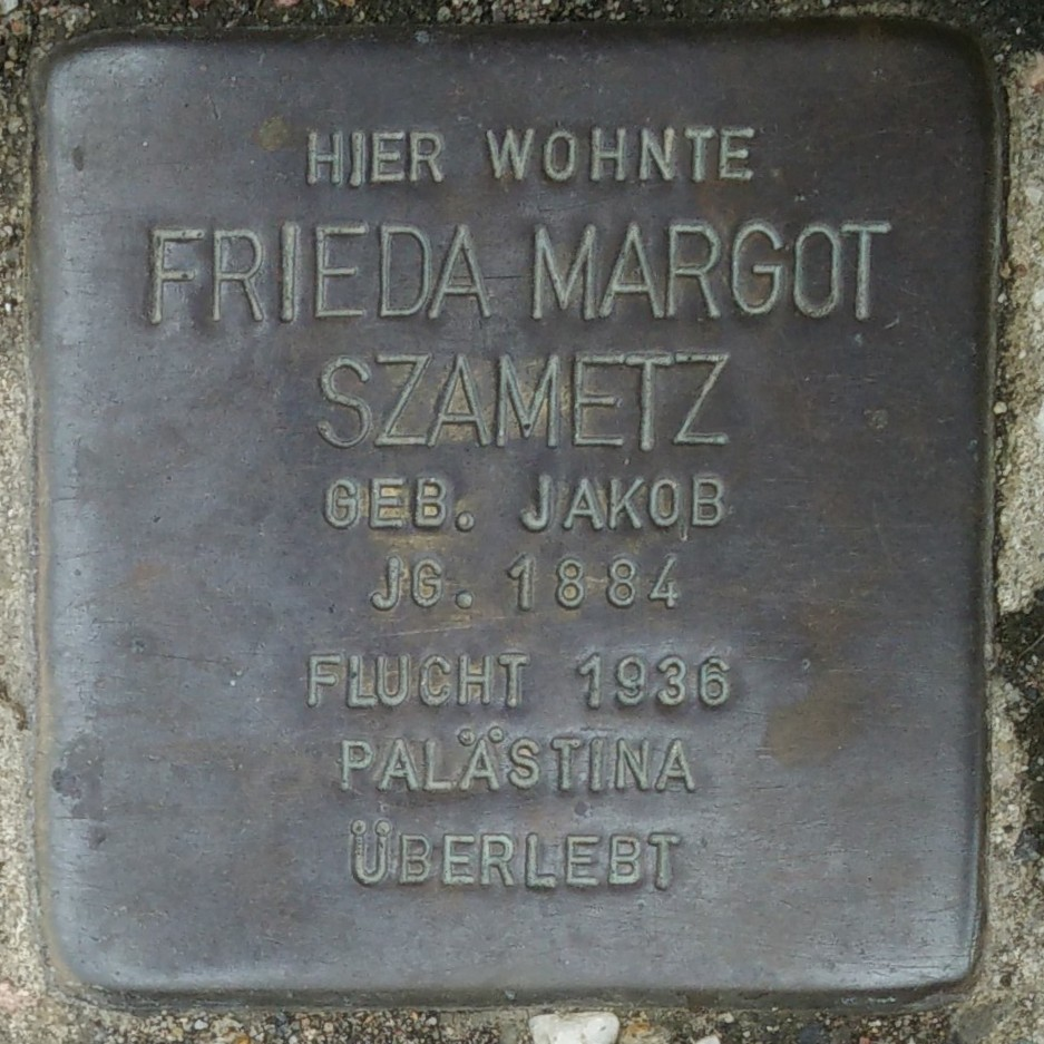 Bad Vilbel, Stolperstein Frieda Margot Szametz